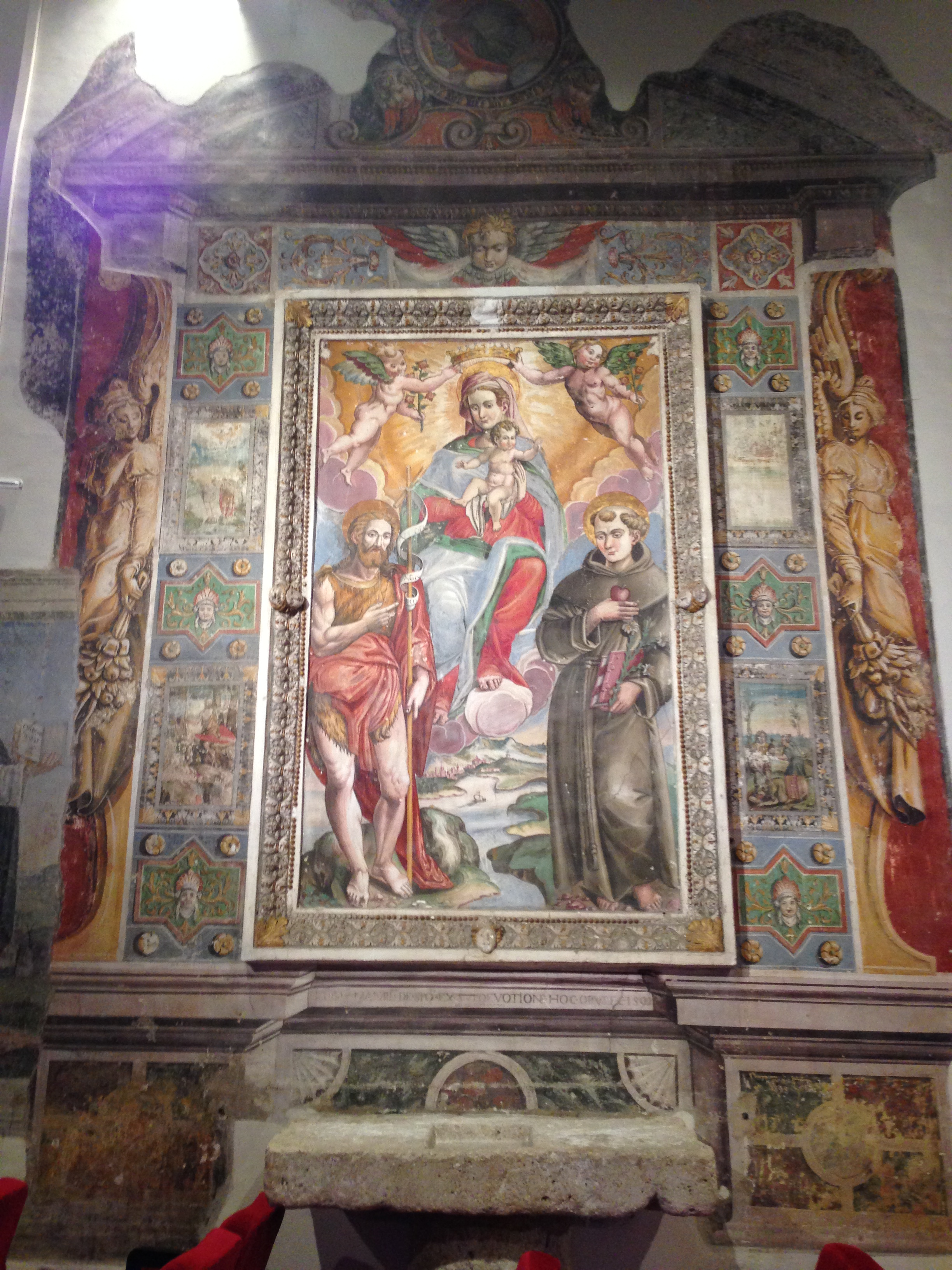 sala Pegasus, Spoleto